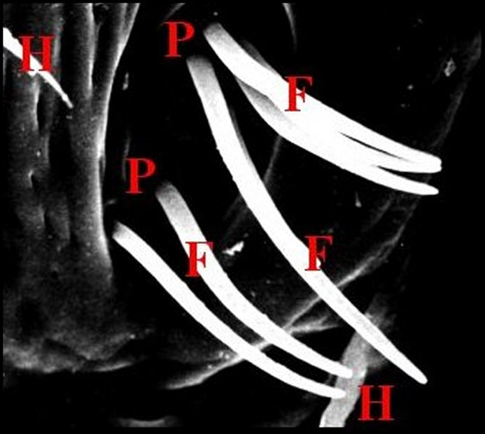 Fusules épigastriques d' Araniella cucurbitina en vue partielle (détail) au microscope électronique à balayage